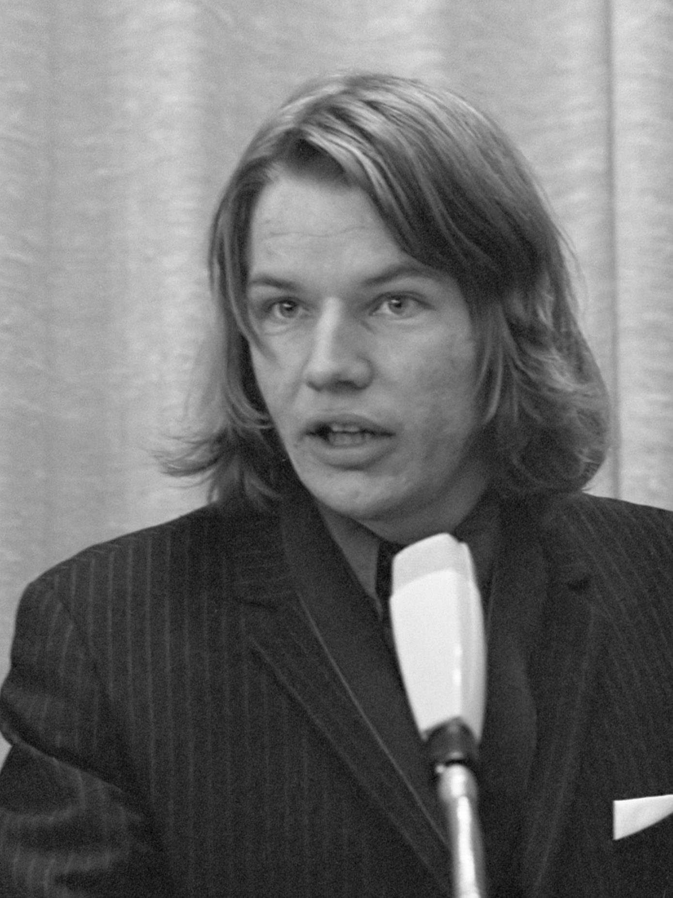 Congres "Wat bezielt die jongens in Hilversum" RAI Adam Jan Haasbroek 10 januari 1970